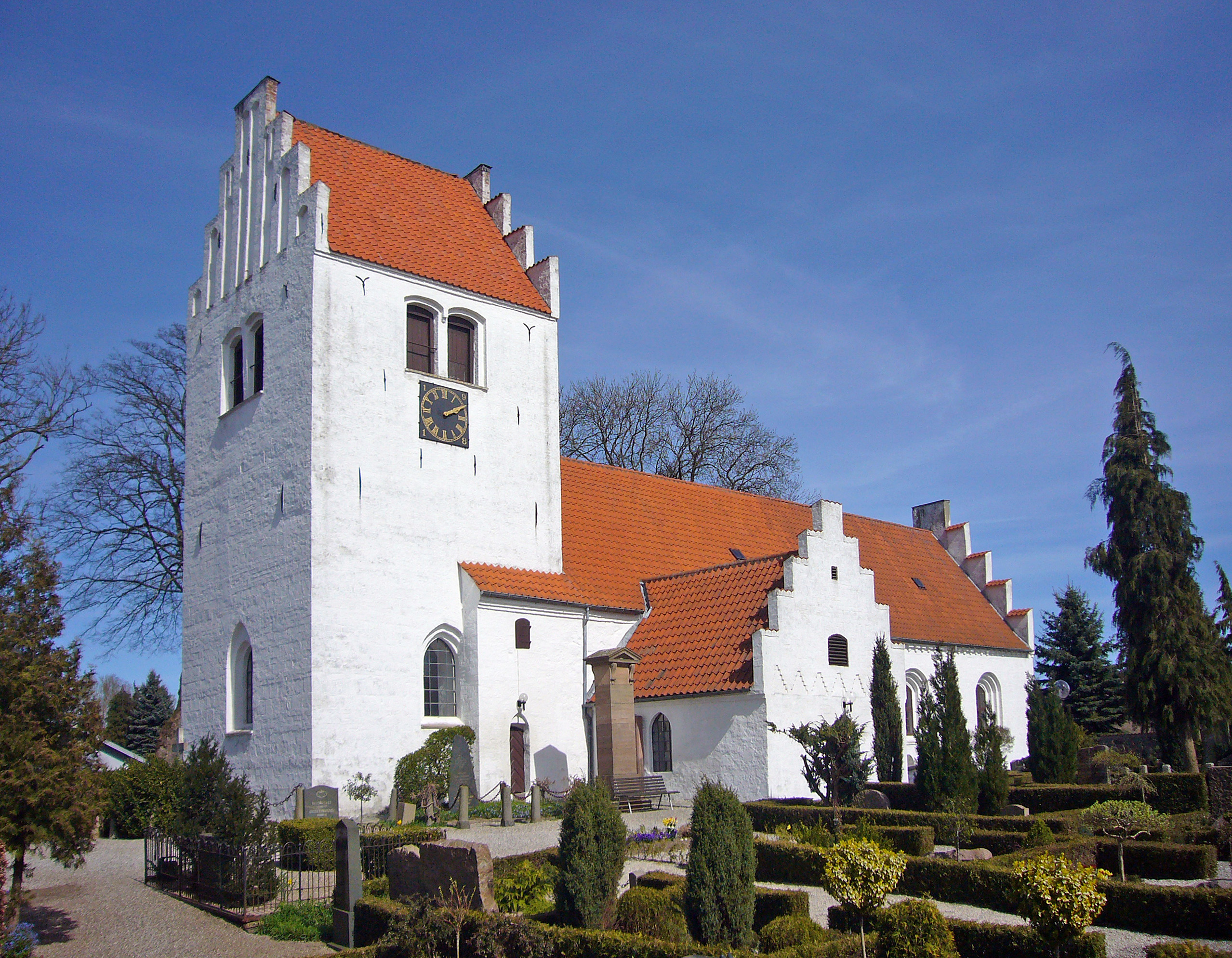 Sengeløse Kirke, Høje-Taastrup, Denmark. Sengeløse Kirke